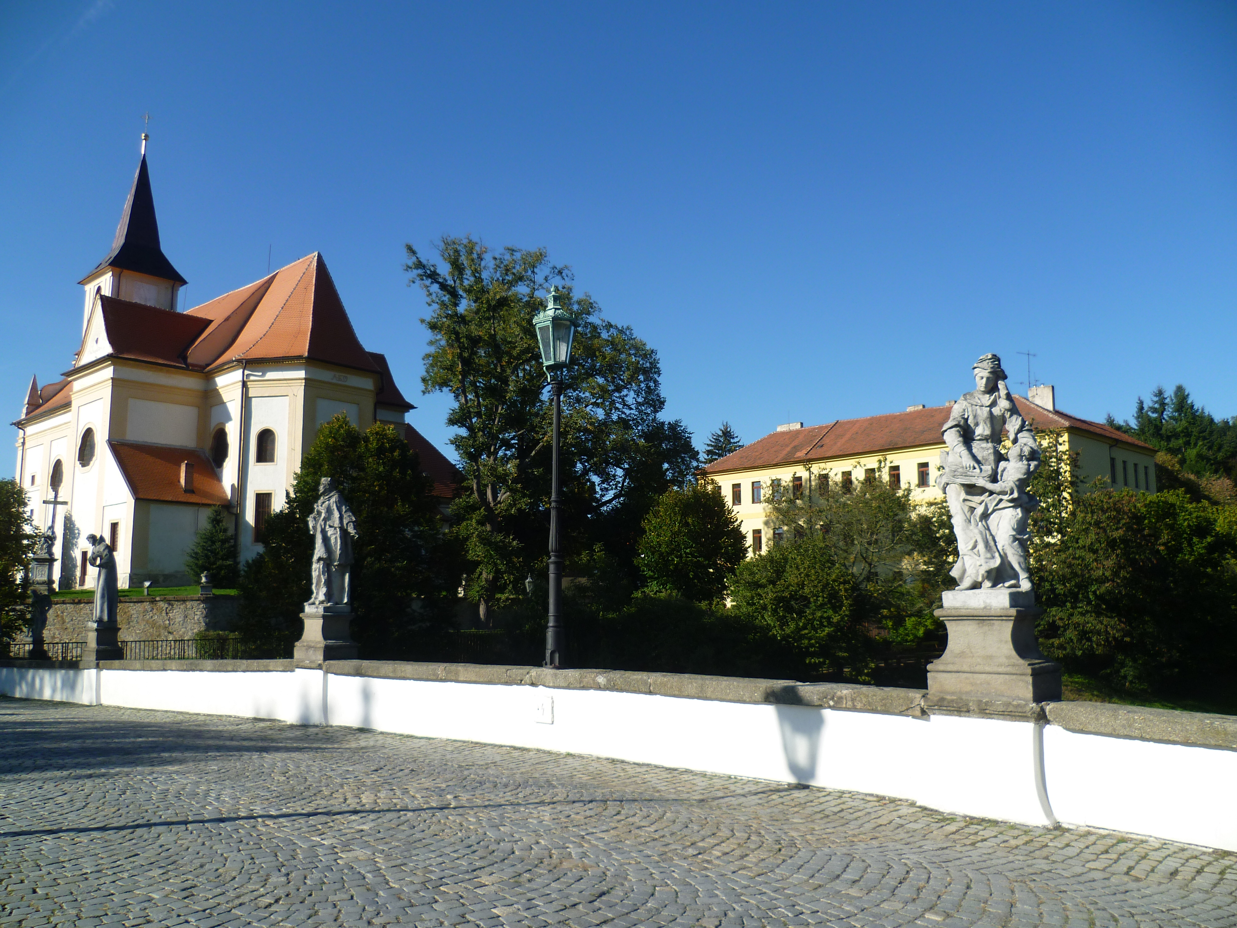 Náměšť nad Oslavou-alibaba